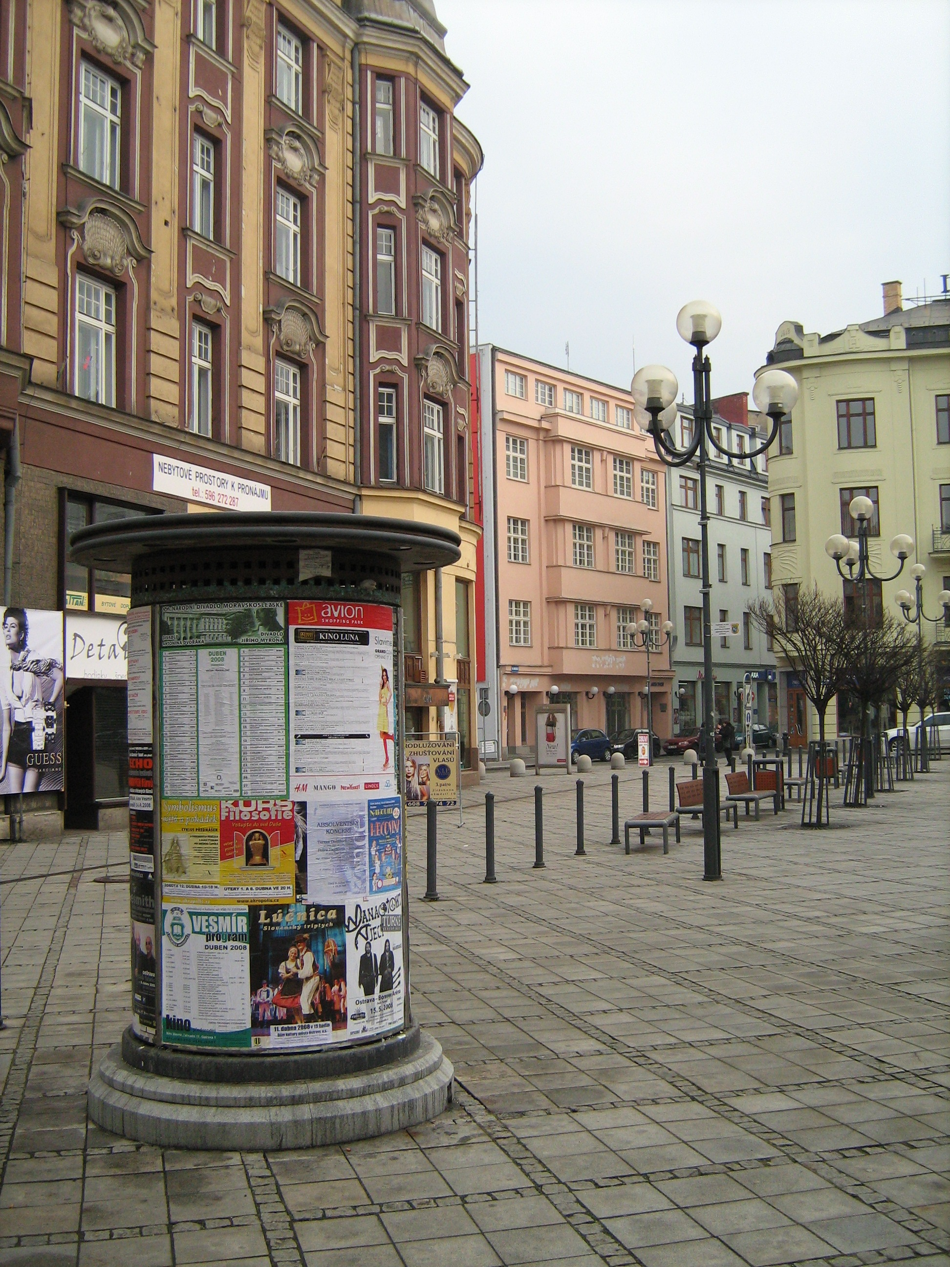 Jiráskovo náměstí v Ostravě alias Kuří rynek